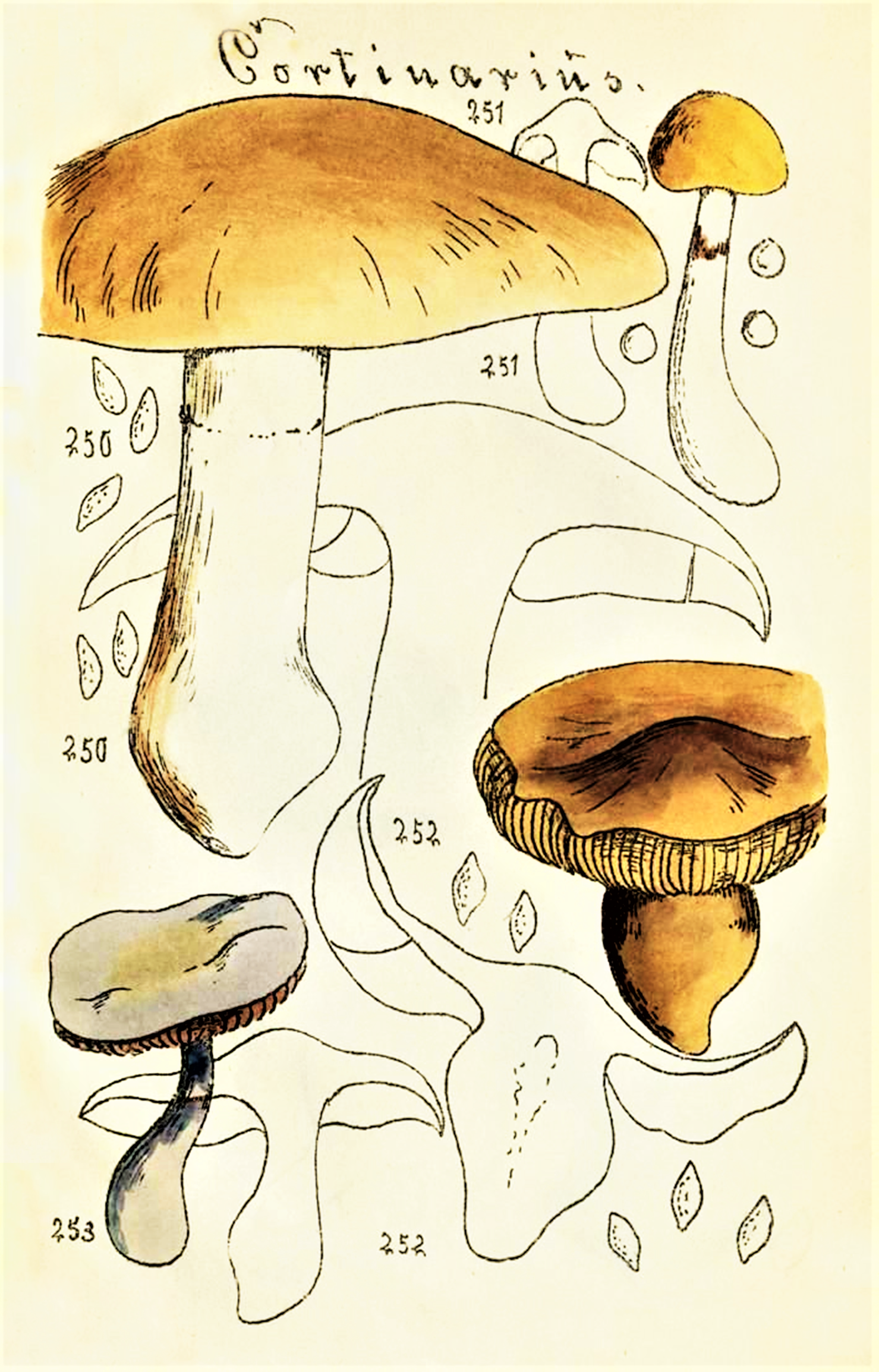 Britzelm.: „Cortinarius”, 1892, Nr. 250-252